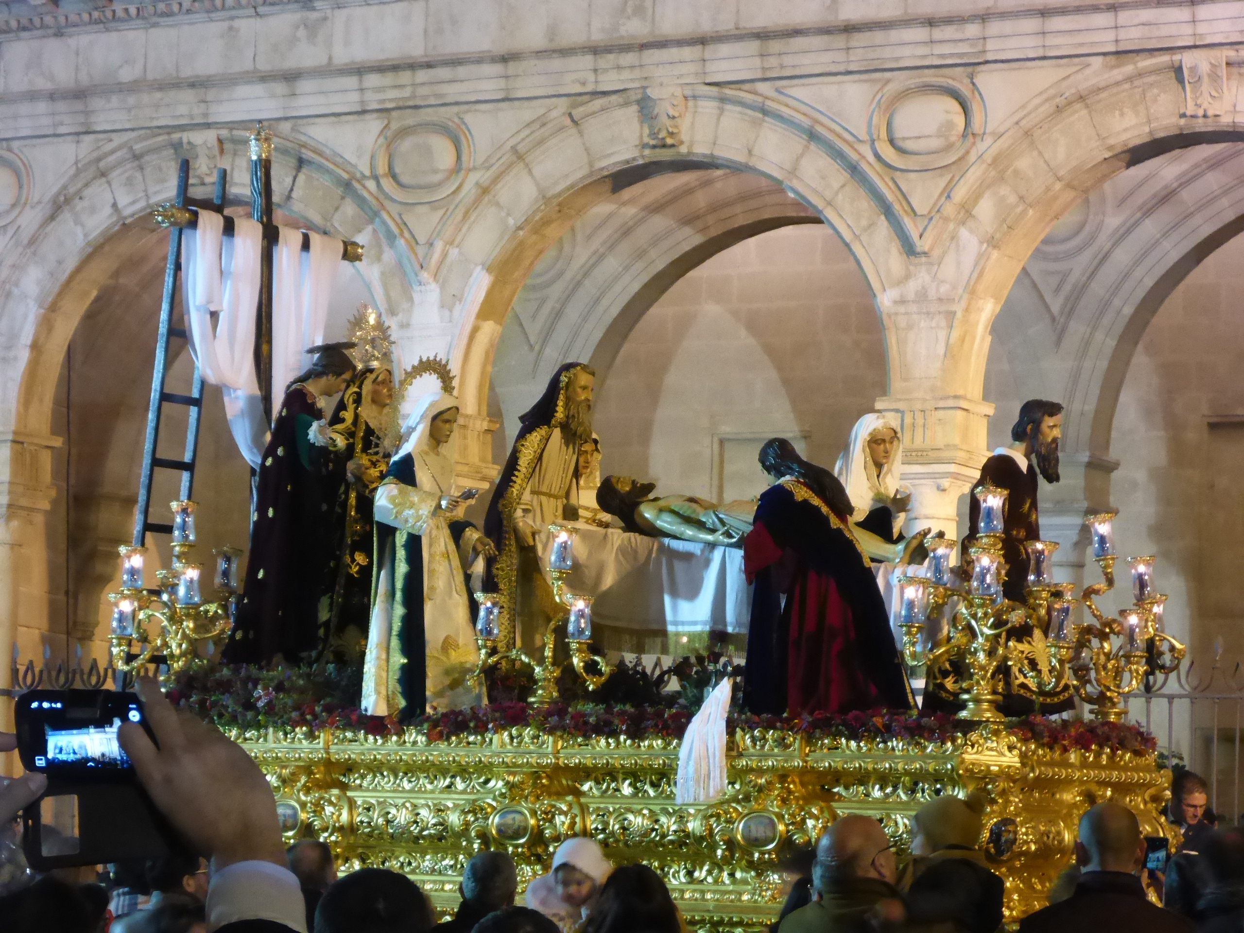 Hermandad de Santa Marta (Jerez) This is a photography of a Folklore festival in Spain (Wikidata id Q6124533).